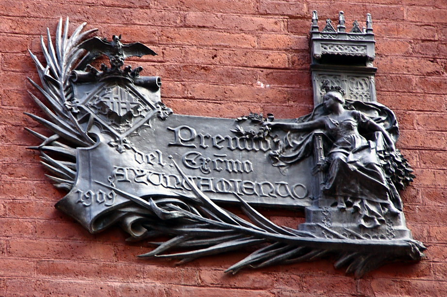 Placa de guanyador del Concurs anual d'edificis artístics atorgat per l'Ajuntament de Barcelona entre 1899-1930. El de la foto és del Palau de la Música (1909).